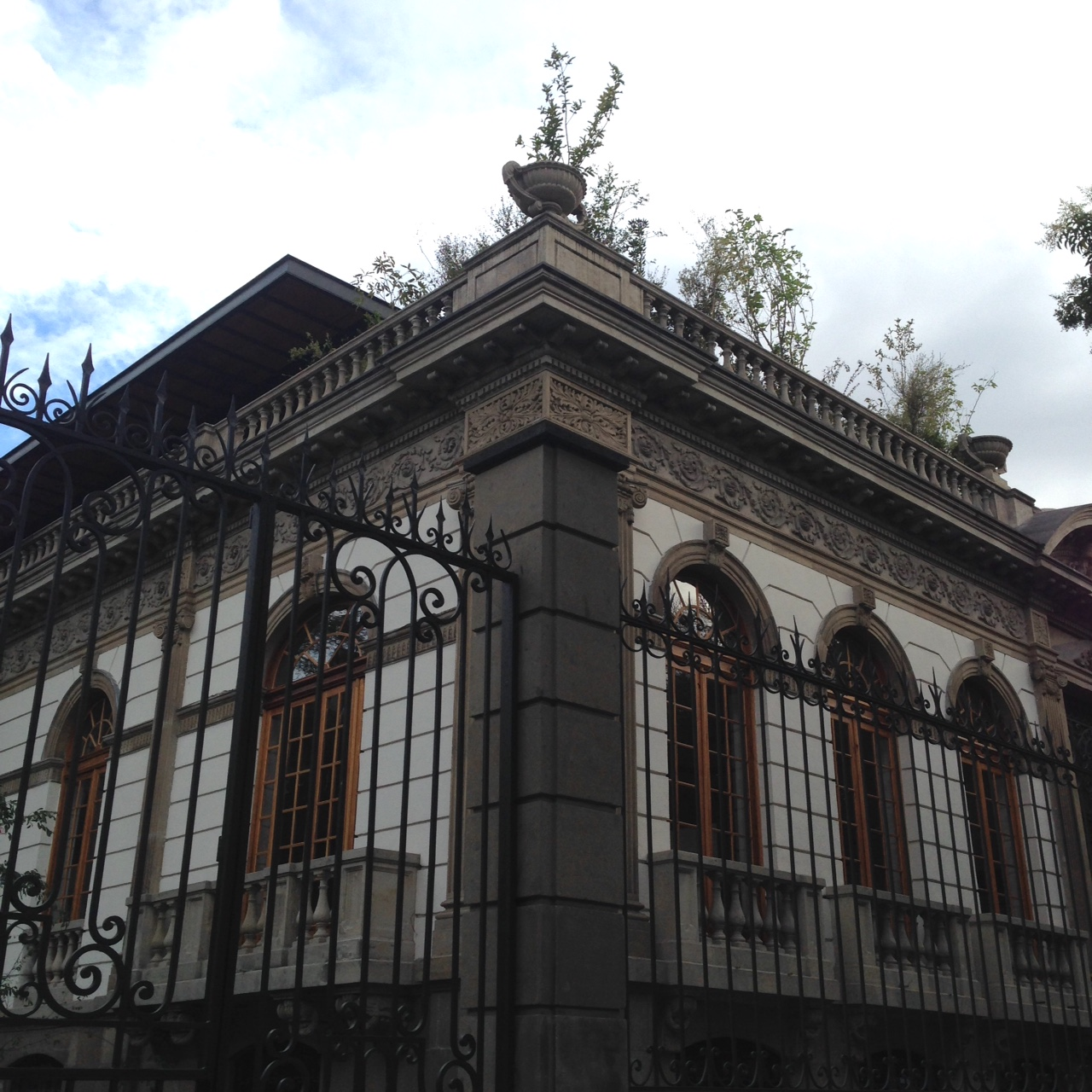 Fachada principal de la Rectoría de la EBC - Tomada en octubre de 2015.